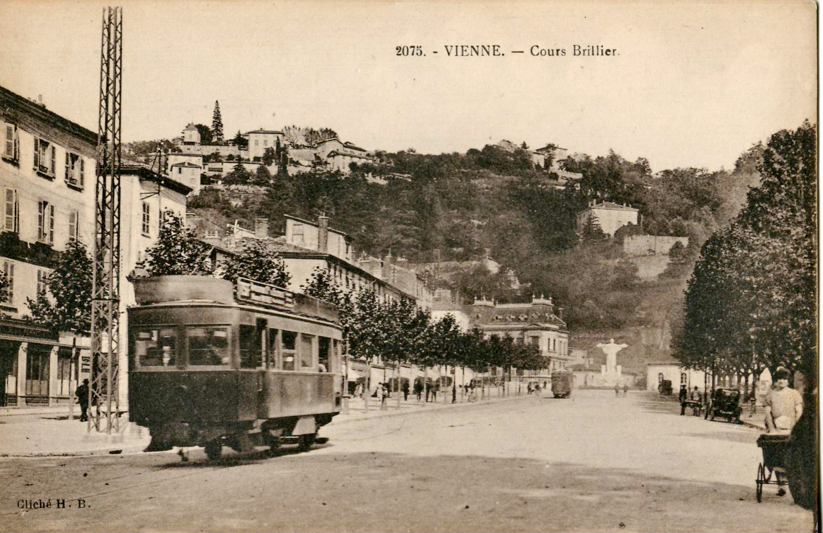 Carte postale ancienne éditée par Blanchard (H. B.) n°2075 :VIENNE - Cours Brillier